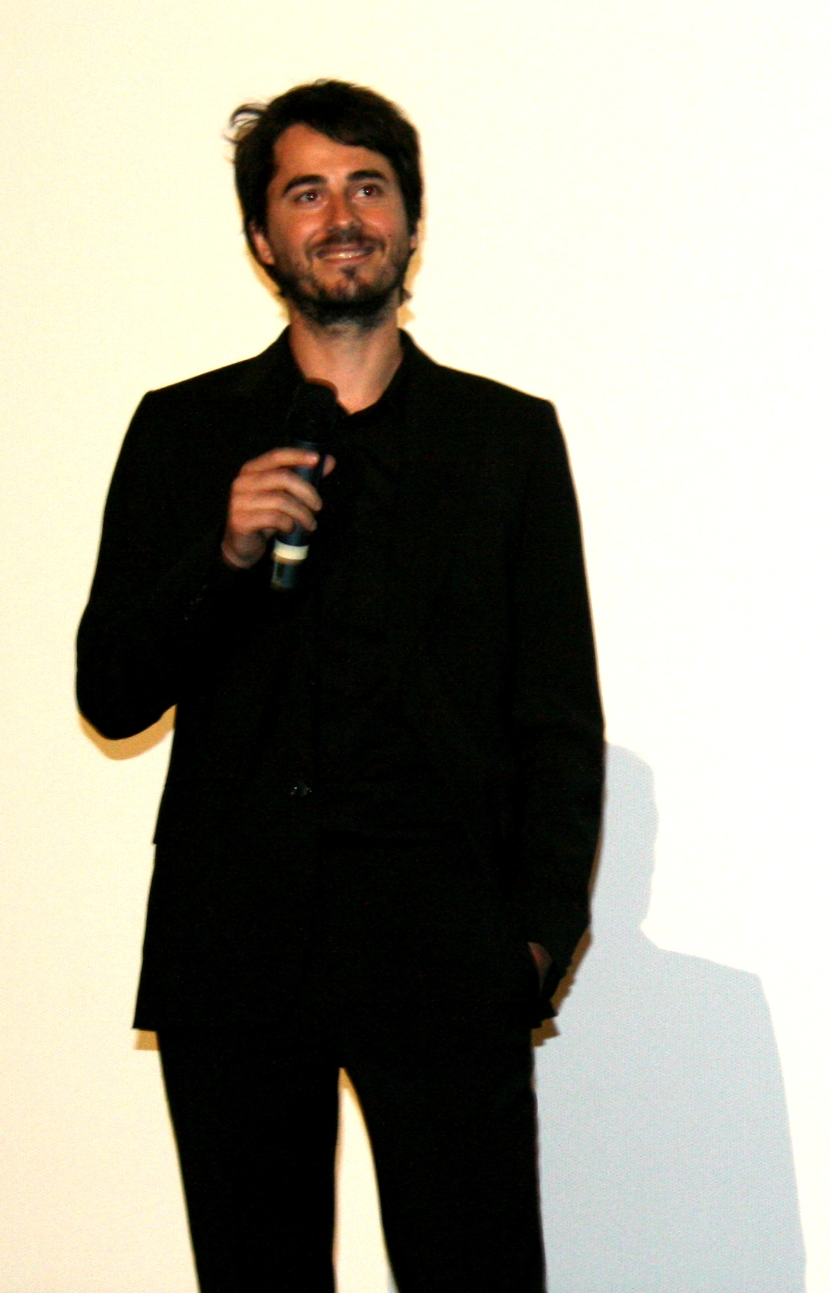 Rémi Bezançon à l'avant-première du Premier jour du reste de ta vie diffusée à l'UGC Ciné Cité Bercy, à Paris.